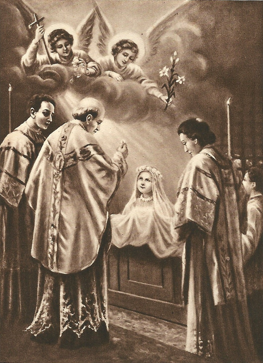 Gravure de Sainte Thérèse de l'Enfant Jésus, Histoire d'une âme écrite par elle-même, Lisieux, Office central de Lisieux (Calvados), & Bar-le-Duc, Imprimerie Saint-Paul, 1937, édition 1940. « Thérèse lors de sa première communion, dans la chapelle des Bénédictines de Lisieux ».